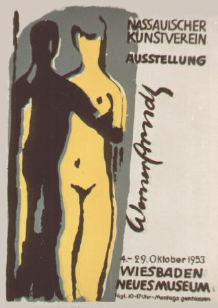 Werner Arndt: Ausstellungsplakat, Handsiebdruck, 1953 für eine Ausstellung im Nassuischen Kunstverein, 4.-29. Oktober 1953 im Neuen Museum, Wiesbaden